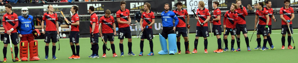 Herrenteam des KHC Dragons 2017 bei der EHL 2017 in Eindhoven